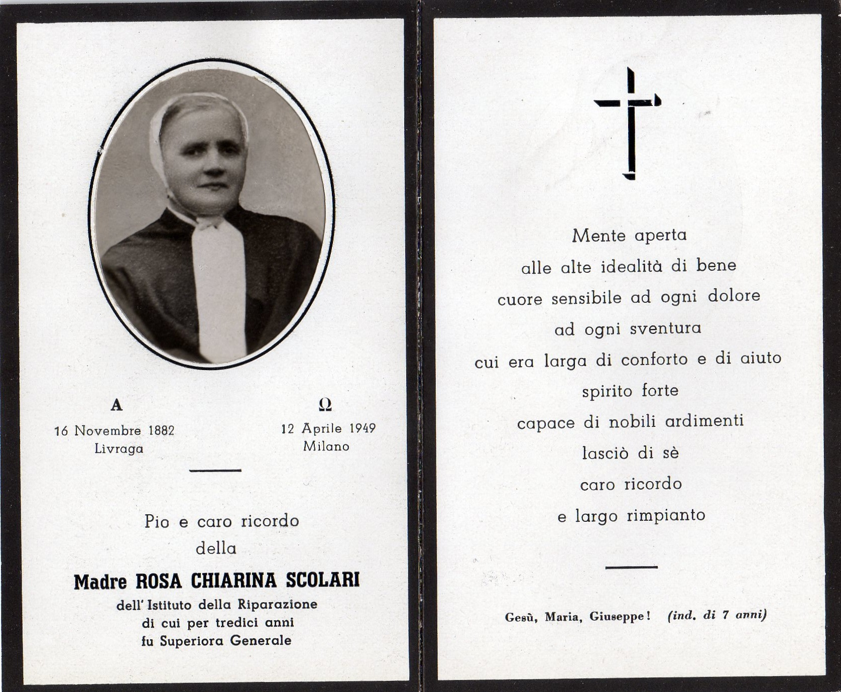 Cartolina celebrativa della Madre Rosa Chiarina Scolari Superiora Generale per 13 anni dell' Istituto della Riparazione (Milano)- Archivio famiglia Aliprandi